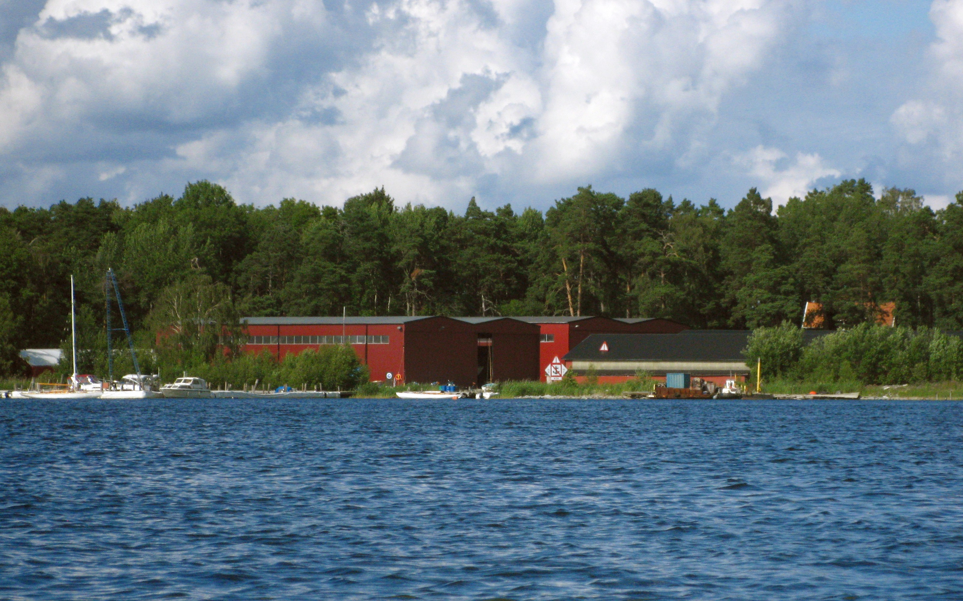 Varvet på Stora Skraggen, Djursholm, Stockholm.